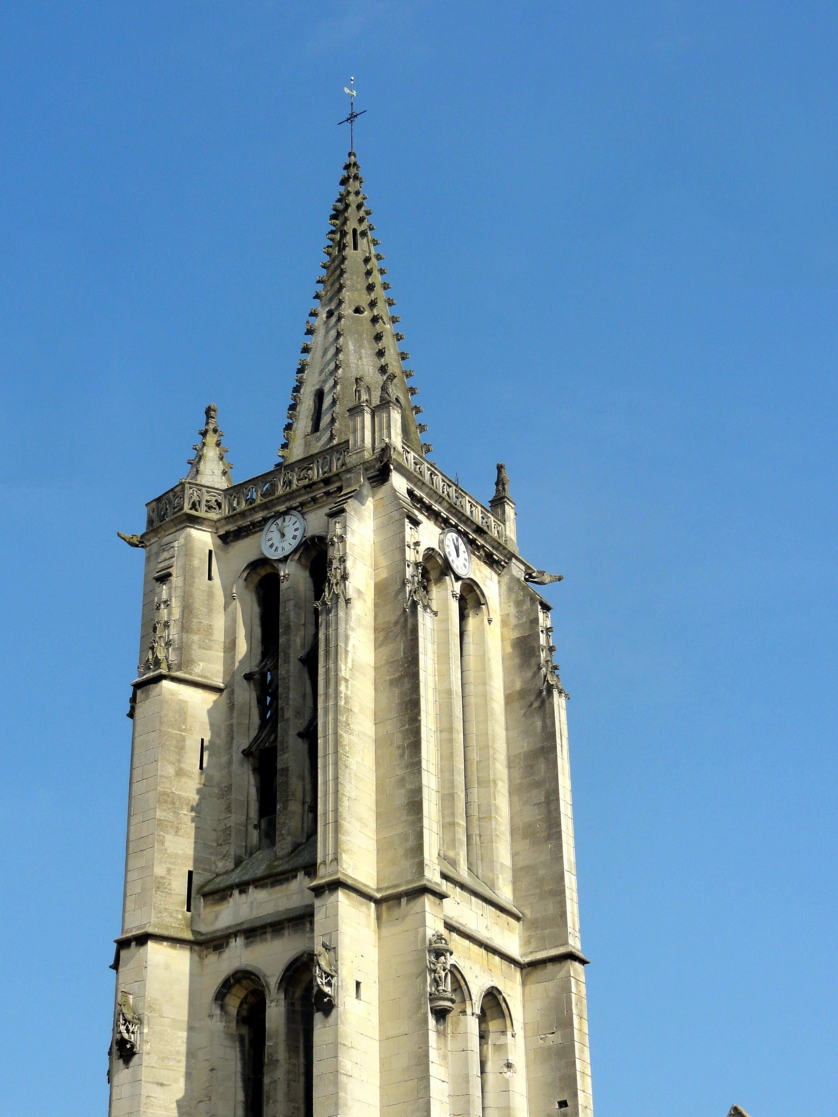 Clocher dont la flèche a été achevée au milieu du XVIe siècle ; vue depuis le sud-est.